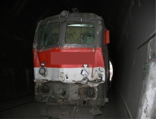 Am 1. Dezember 2015 kam es auf der Semmeringbahn vor dem Bahnhof Semmering zu einer Zugtrennung und einer damit verbundenen Zwangsbremsung eines bergauf fahrenden Holzzugs, der 205 Tonnen schwerer war als erlaubt. Der nachfolgende Güterzug musste am vorherigen Streckenblock anhalten. Die ÖBB 1144 282 wurde mit der Absicht nachgeschickt, am Schluss des wartenden Zuges anzukuppeln und ihn zurück zum Bahnhof Breitenstein zu bringen. Während der Anfahrt der Hilfslokomotive setzte sich der wartende Zug unbeabsichtigt rückwärts bergab in Bewegung, so dass es im Polleros-Tunnel zum Zusammenstoß mit der bergauf fahrenden Hilfslokomotive kam. Etliche Containerwagen entgleisten und wurden zerstört, die Hilfslokomotive sowie die Gleis-, Oberleitungs- und Signalanlagen im Tunnel wurden schwer beschädigt. Der Sachschaden betrug mehr als fünf Millionen Euro. Beschädigte Hilfslokomotive 1144 282 im Polleros-Tunnel